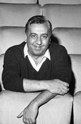 immage of sandro giovannini in sistina theatre